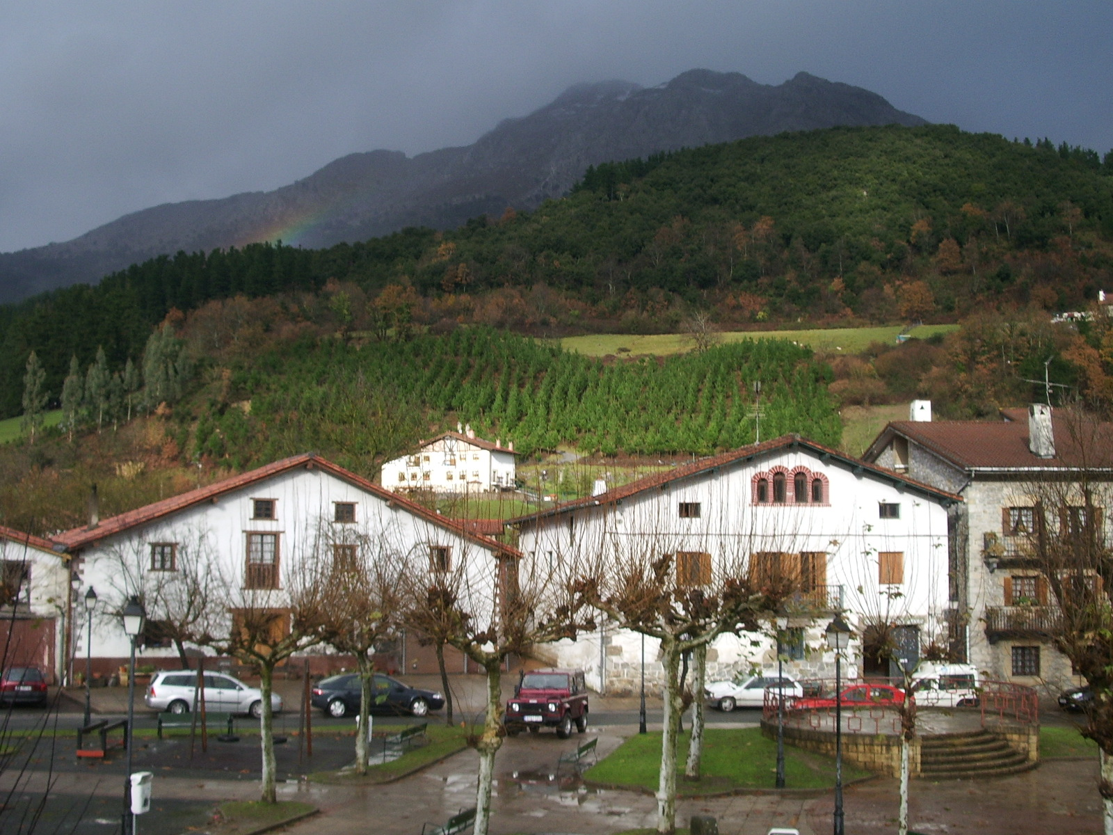 Arrasateko Garagartza auzoa atzean Udalaitz duela Nik neuk egina